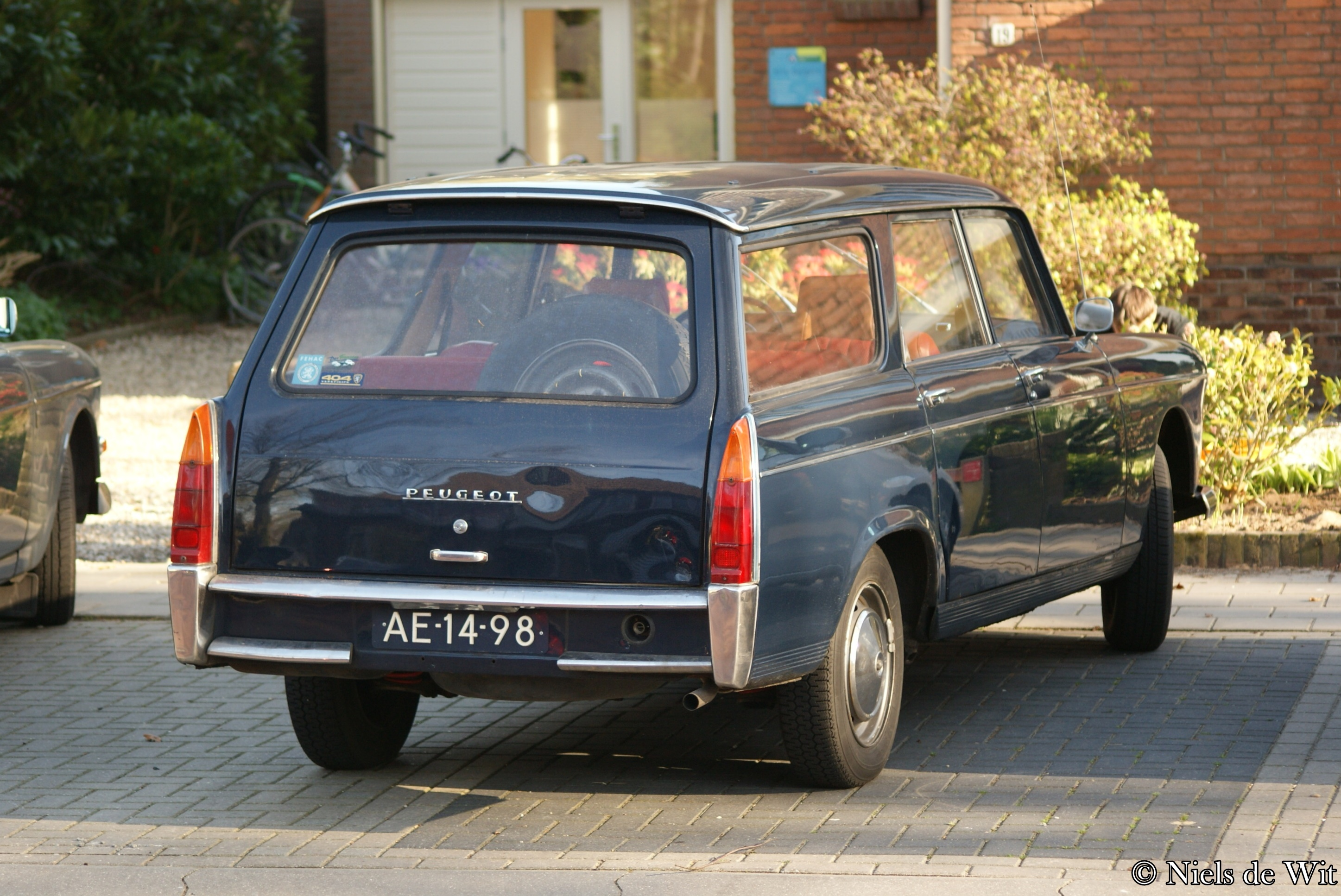 AE-14-98 Prinsesselaan, Ede